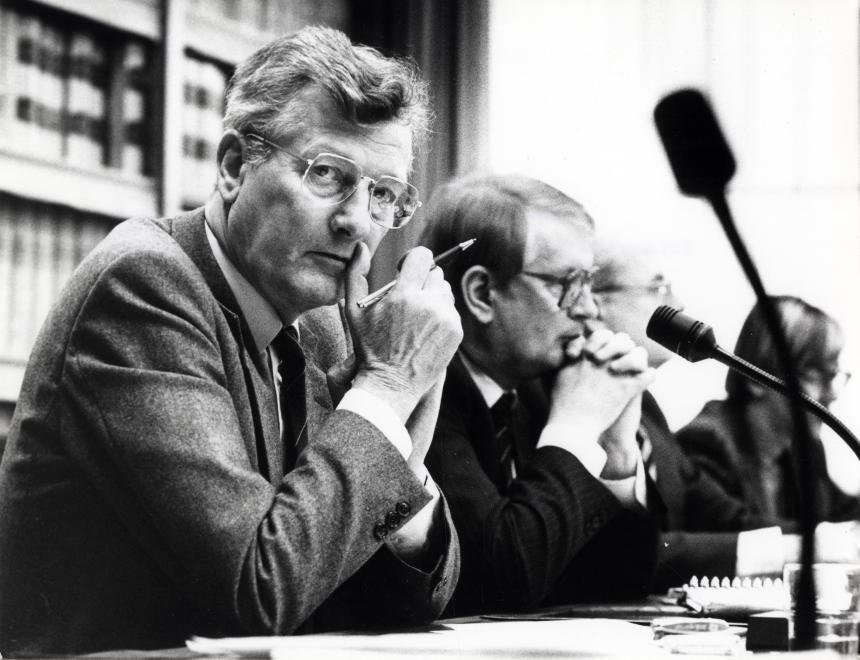 Minister J. de Koning (CDA) tijdens een vergadering van de Kamercommissie Antiliaanse Zaken. Nederland, Den Haag, 13 februari 1985.